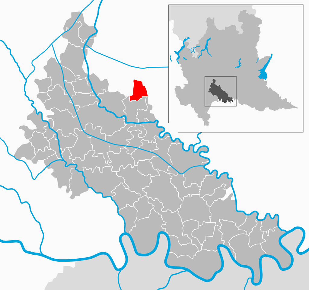 Il comune di Crespiatica nella provincia di Lodi